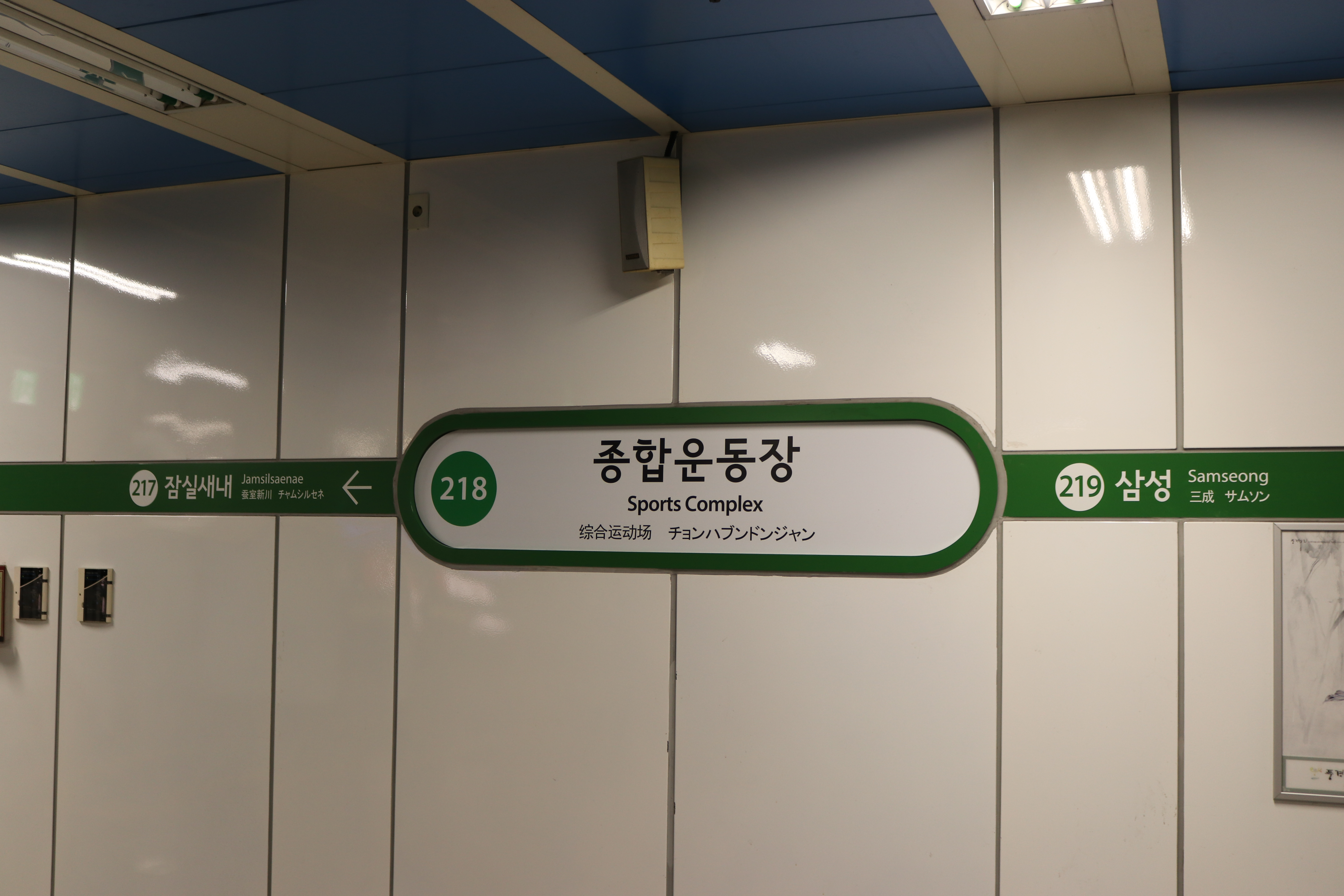 종합운동장역 2호선 역명판